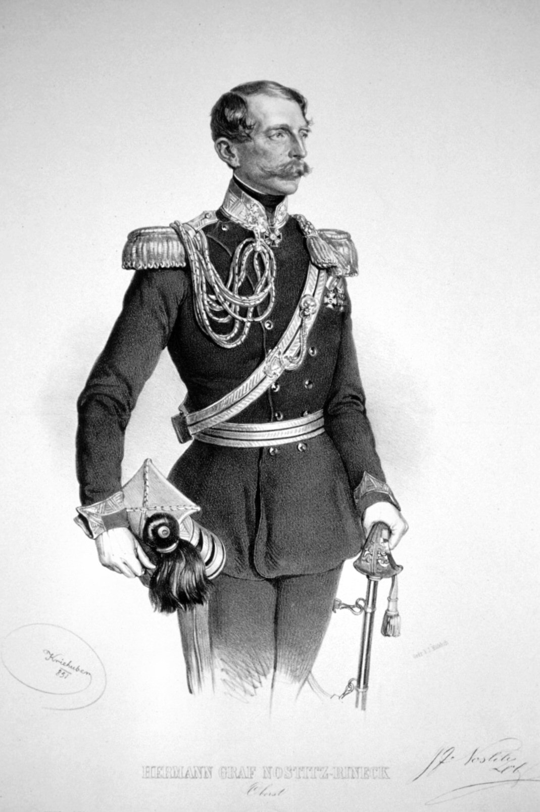 Hermann Graf Nostitz-Rieneck (1812-1895) Feldmarschallleutnant, Ritter des Maria-Theresien-Ordens, als Oberst. Lithographie von Josef Kriehuber, 1851